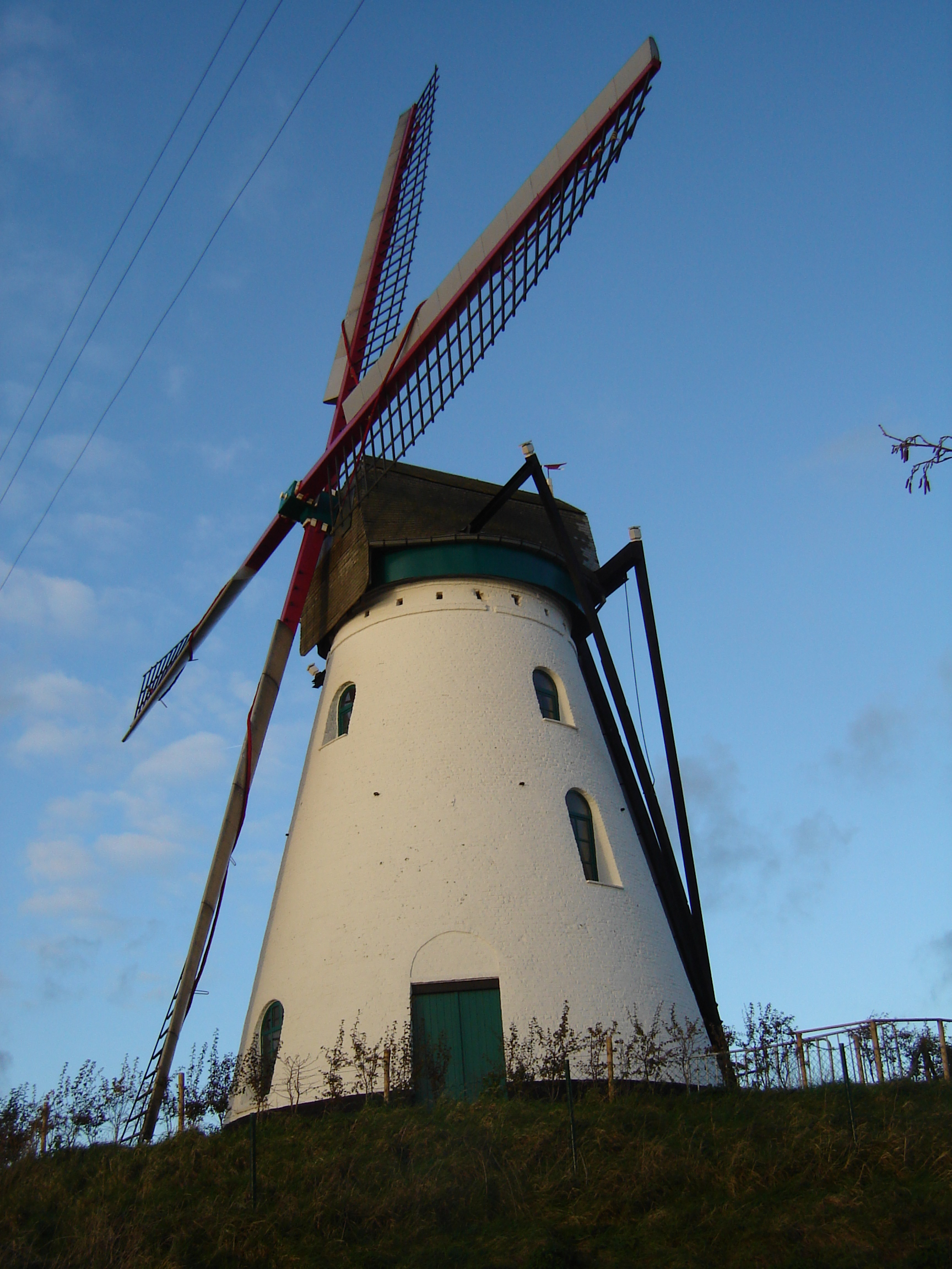 Brouckmolen in Beveren-aan-de-IJzer, Alveringem. Brouckmolen windmill in Beveren-aan-de-IJzer, Alveringem, West-Flanders, Belgium